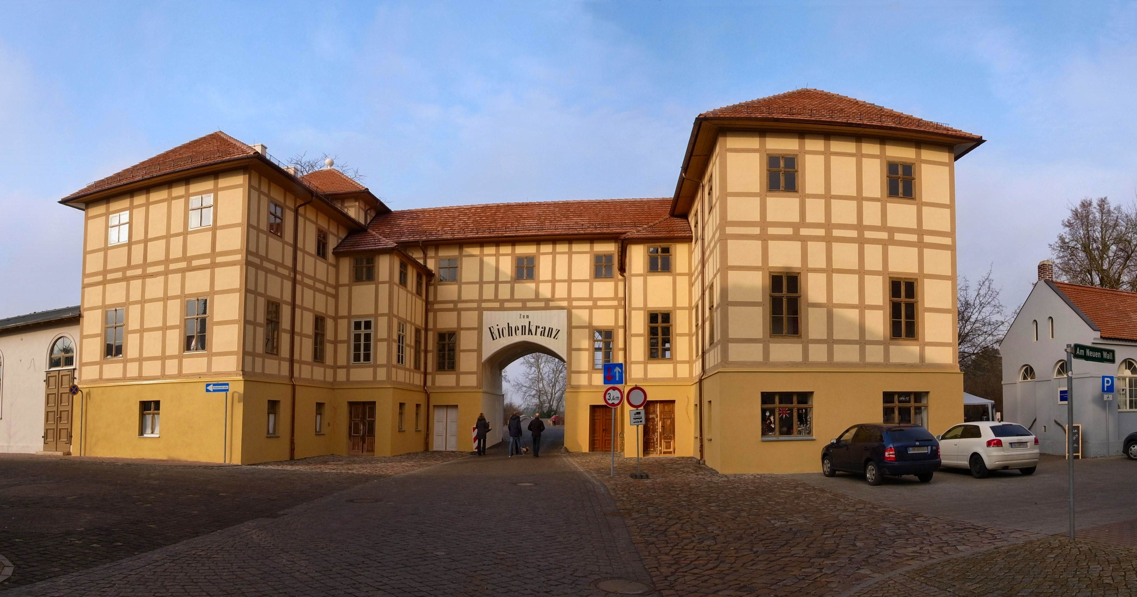 Wörlitz,Historischer Gasthof „Zum Eichenkranz”, erbaut 1785-87